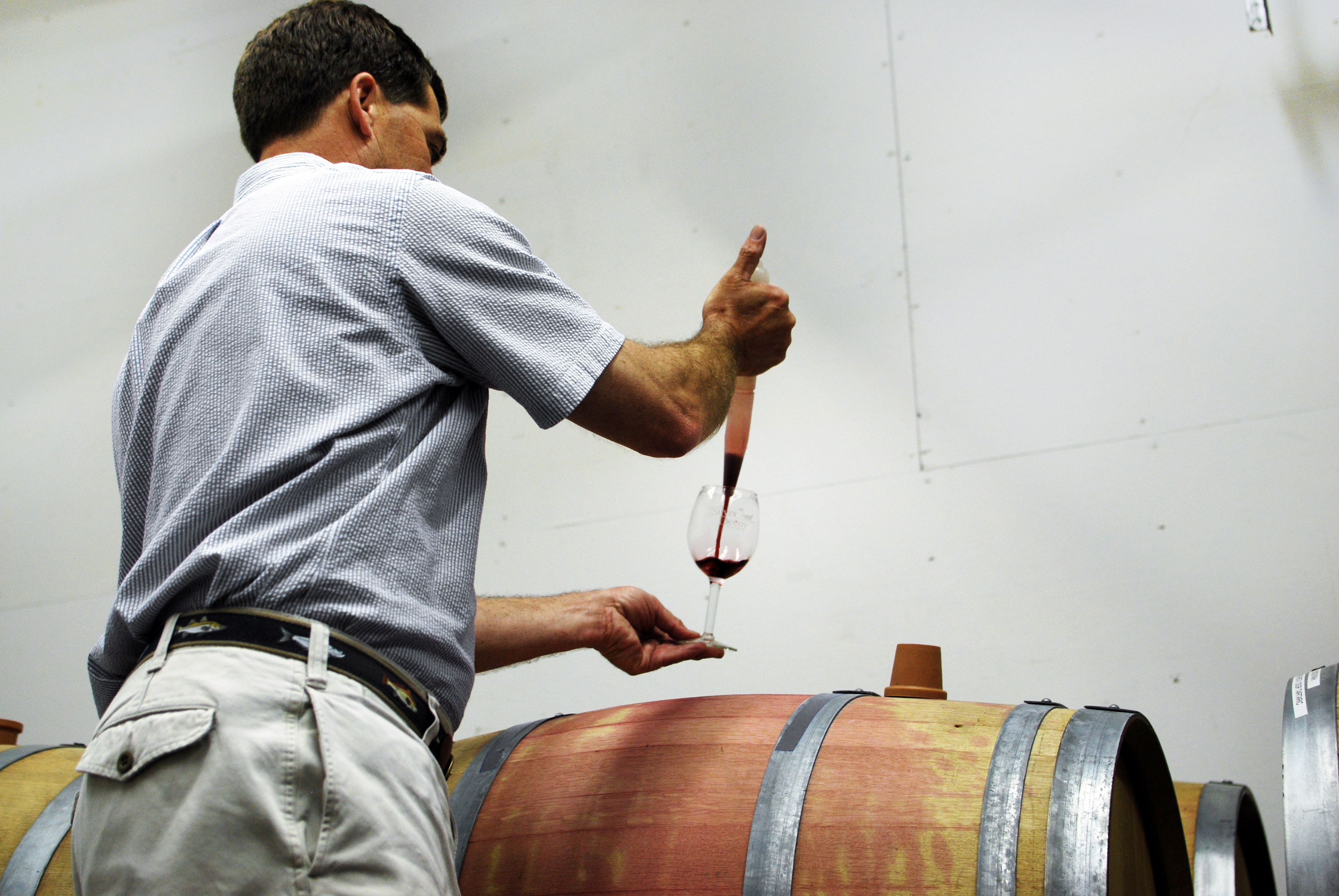 Wine thief